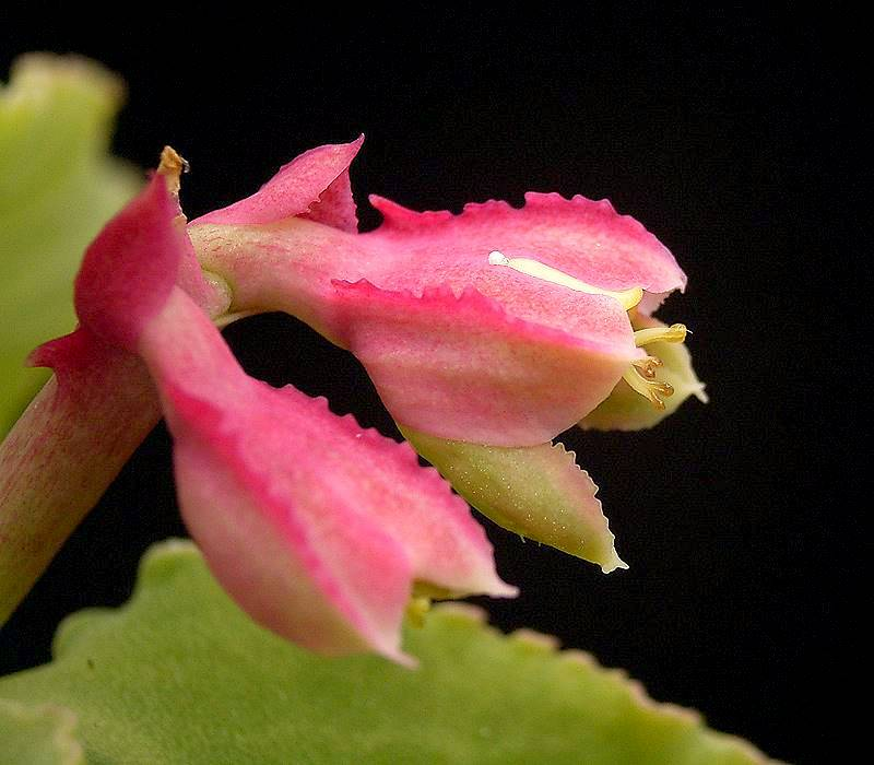 Euphorbia neoarborescens